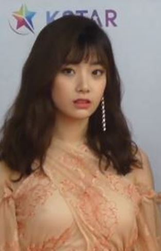 12일 오후 서울 마포구 상암동 월드컵경기장에서 '제 24회 사랑한다 대한민국 2018 드림콘서트'의 레드카펫 포토월 행사가 열렸다.